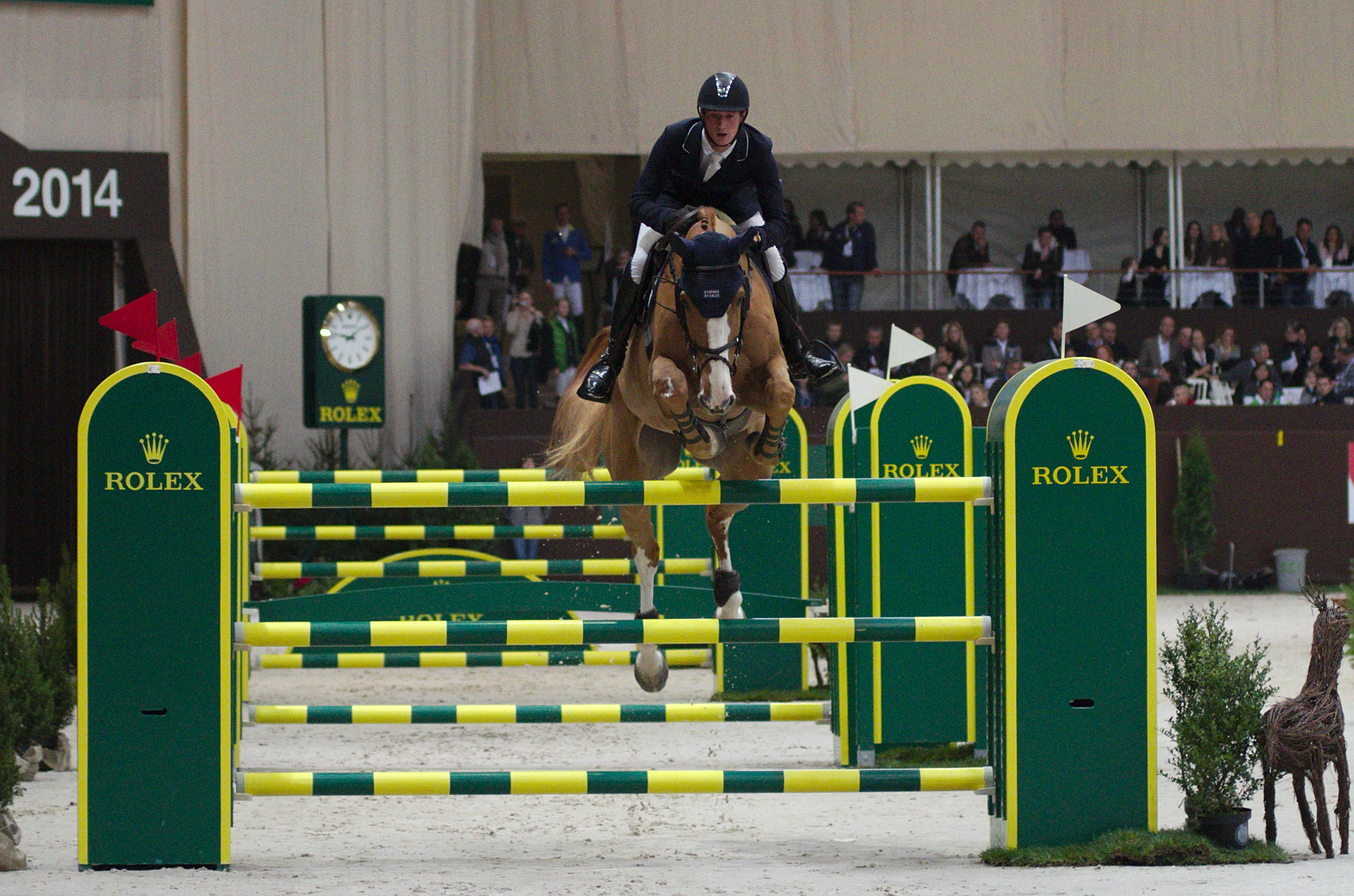 54eme CHI de Genève - 20141213 - Coupe de Genève - Daniel Deusser et First Class Van Eeckelghem